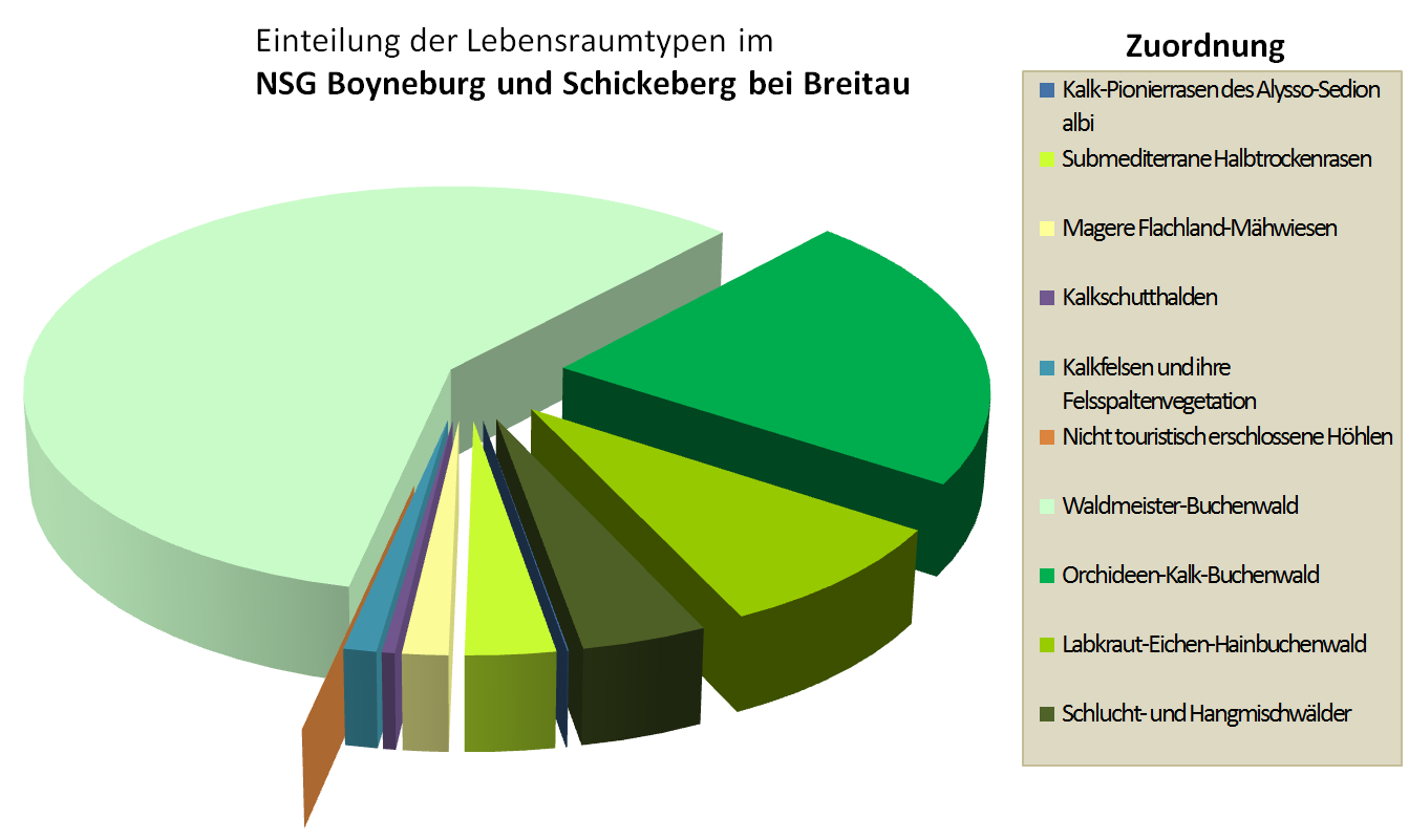 Verteilung der Lebensraumtypen (LRT) im NSG Bereich des FFH-Gebietes: "Boyneburg und Schickeberg bei Breitau", Stand: 12-2013; nach: Maßnahmenplan FFH 4926-350 Boyneburgk und Schickeberg bei Breitau, Regierungspräsidium Kassel, Obere Naturschutzbehörde, (pdf-Datei; 4,23 MB), Stand: Dezember 2013; abgerufen am 23. Februar 2017 Die Werte entsprechen nicht ganz exakt der ausgezeichneten Gesamtfläche des NSG. Die restlichen 70 ha des FFH-Gebietes sind nicht angegeben